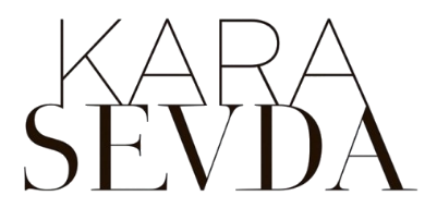 Logo de la serie de televisión Kara Sevda